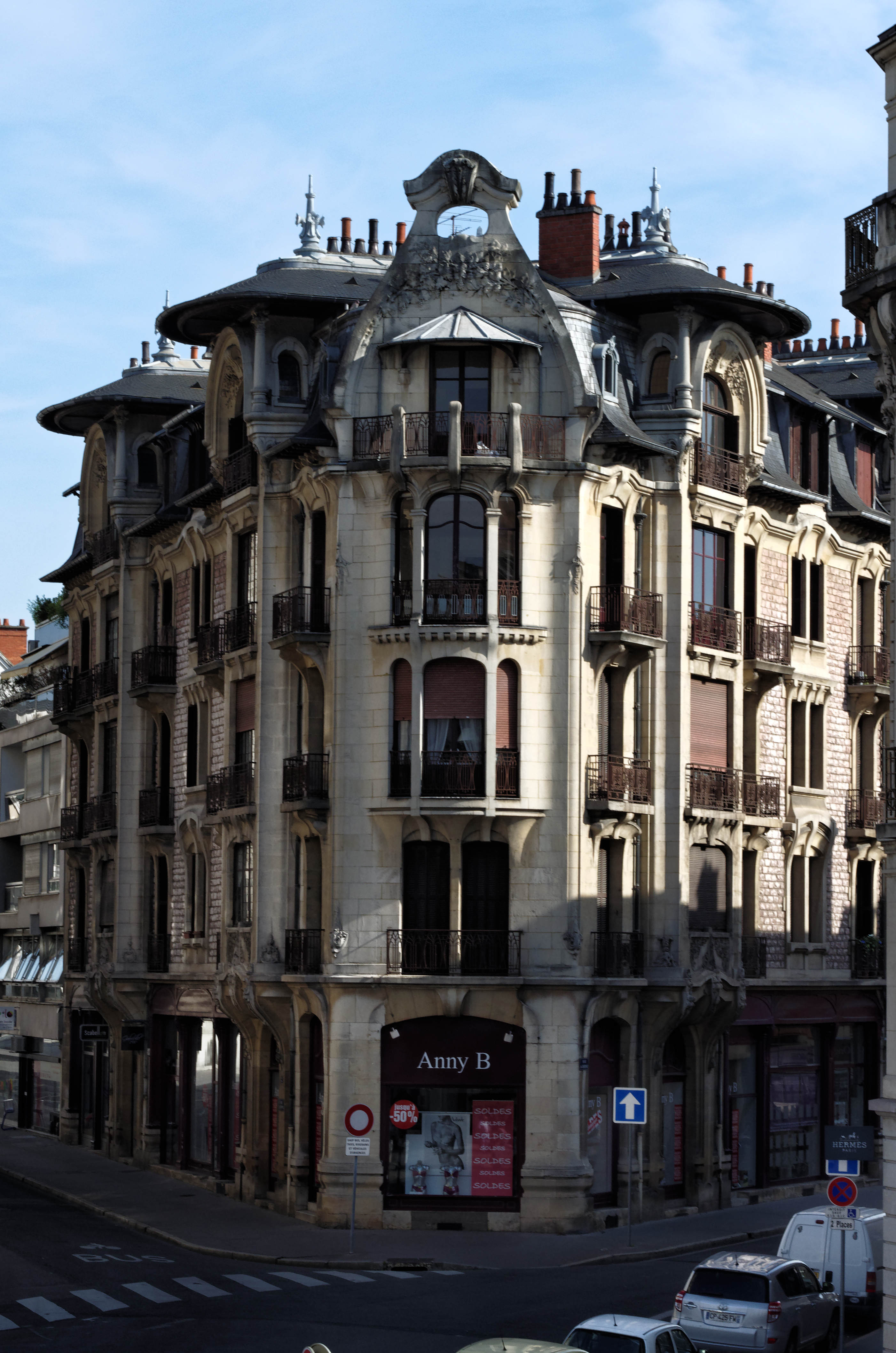 Immeuble construit par Louis Perreau, à l'angle des rues du Château et du Temple à Dijon.